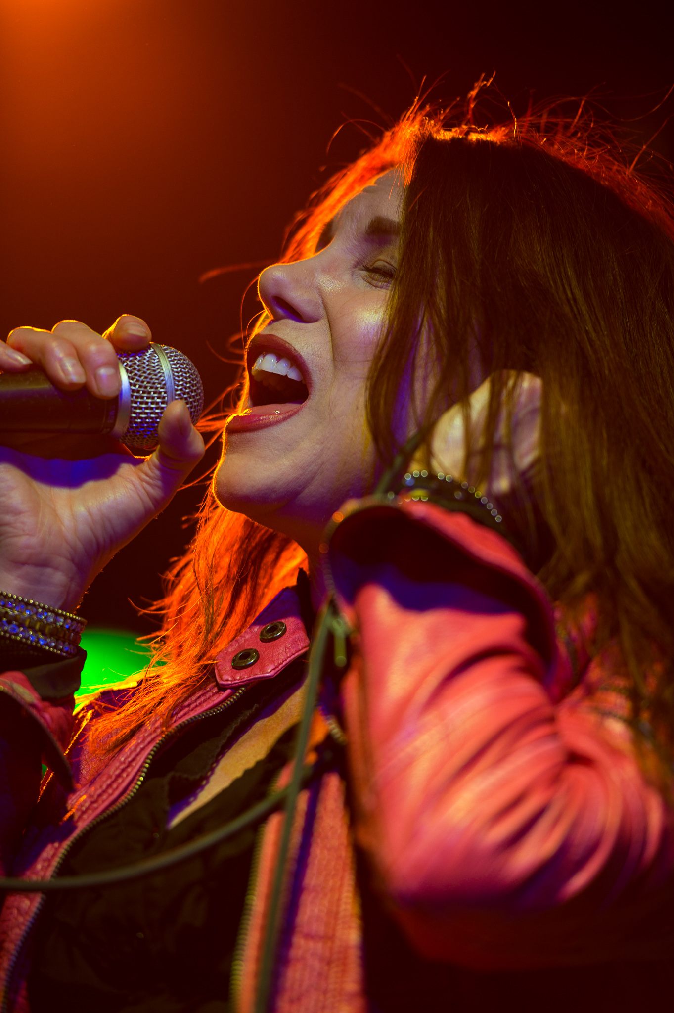 Concertbüro Franken,Der Hirsch,Konzert,Lee Aaron,Livekonzert,Livemusik,Musik